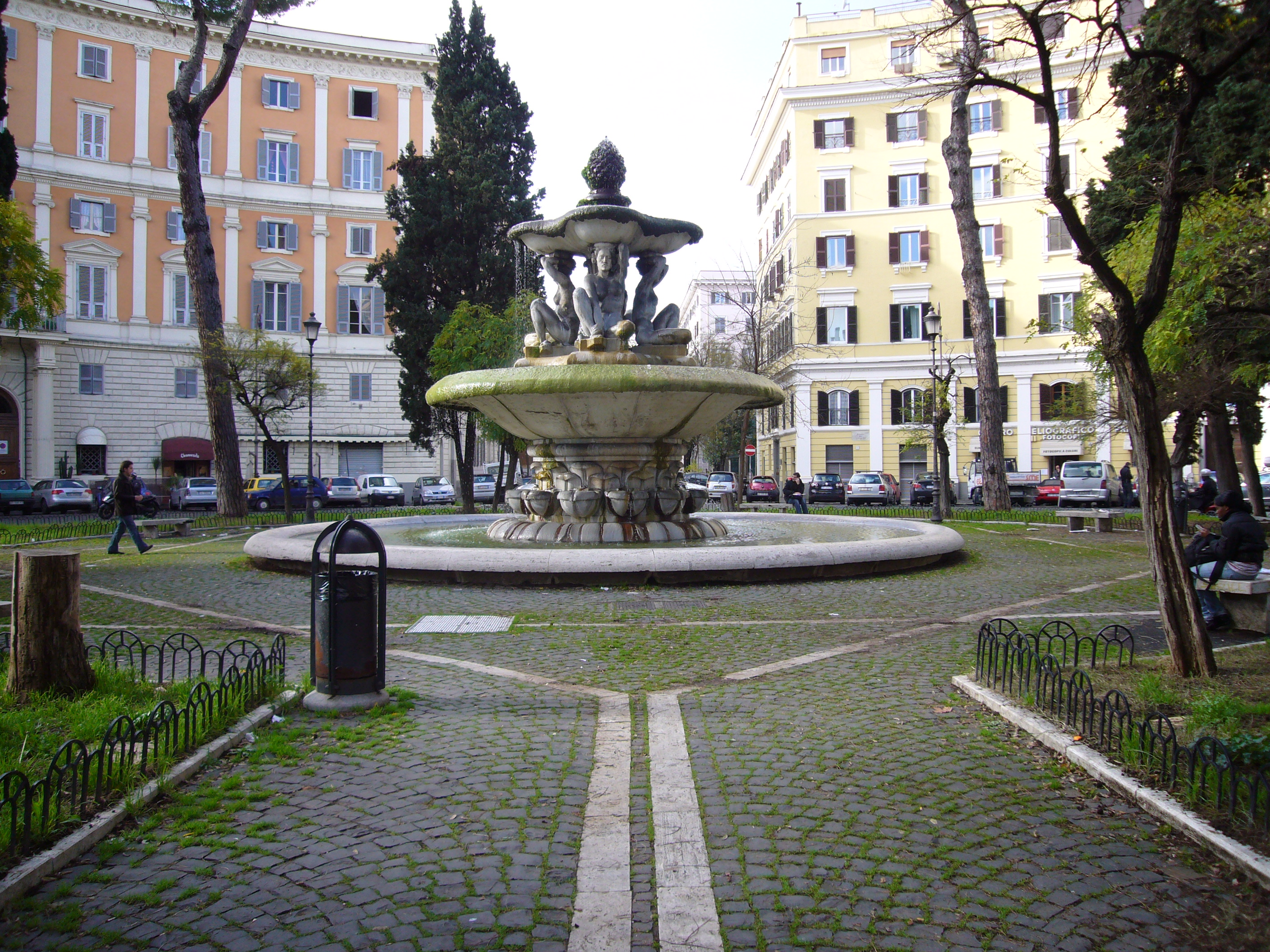 Roma, piazza dei Quiriti con la Fontana realizzata dallo scultore Attilio Selva (1888-1970)